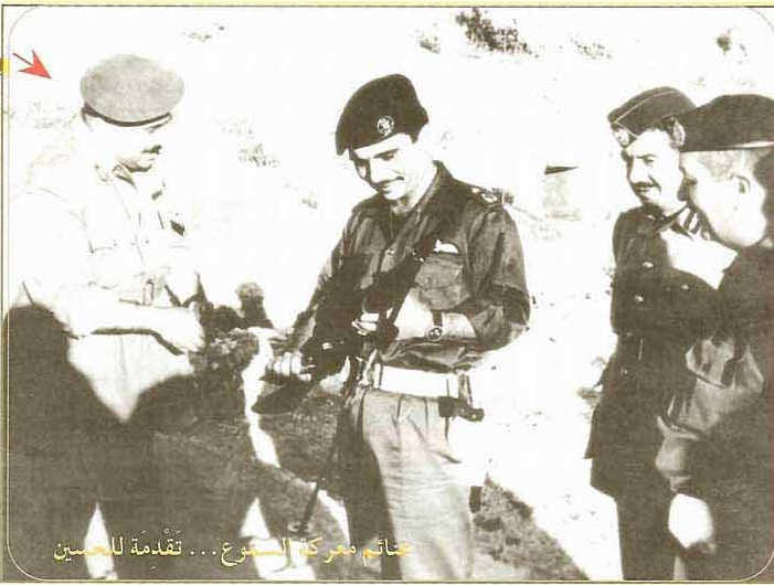 هذا استخدام عادل لهذه الصورة فهي لشخصيات كلهم متوفين، كما أنها لحظة تاريخية لن تتكرر، والصورة هامة في مقال بهجت المحيسن في فقرة معركة السموع صورت عام1966. الصورة تشمل لقطة فيها الملك حسين يتسلم عينة من غنائم المعركة من العقيد بهجت المحيسن